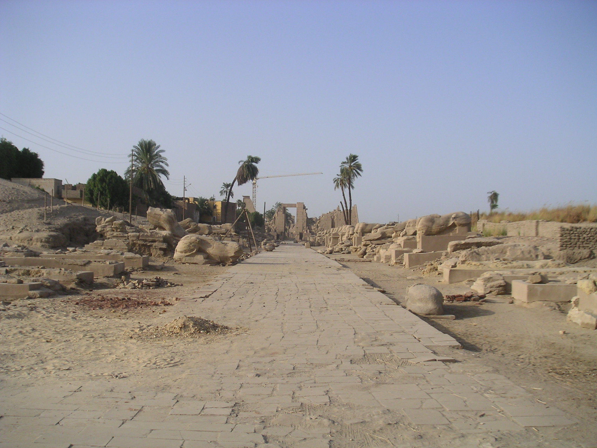 Vue du dromos reliant le temple de Mout à l'enceinte du temple d'Amon-Rê de Karnak - Louxor - août 2005